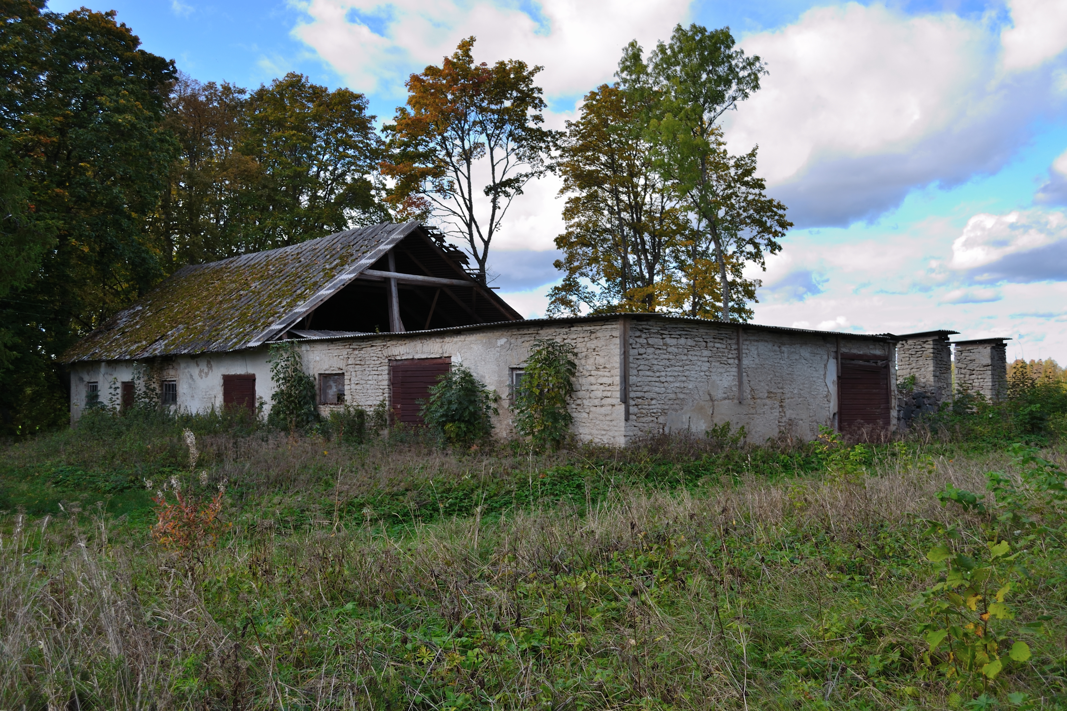 Juuru mõisa tall-tõllakuur